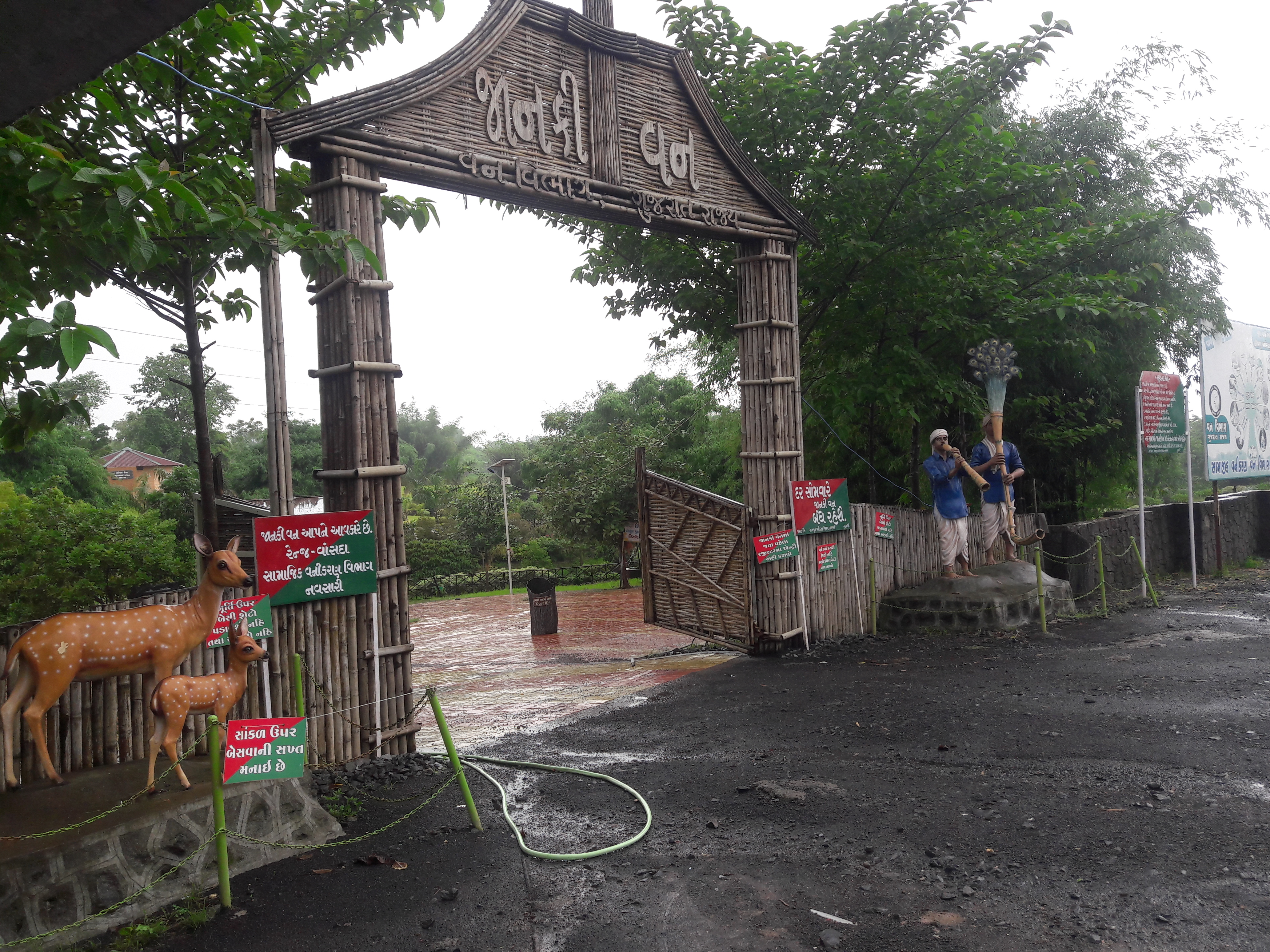 Entry gate, Janki van, Bhinar, Vansda taluka, Gujarat, India